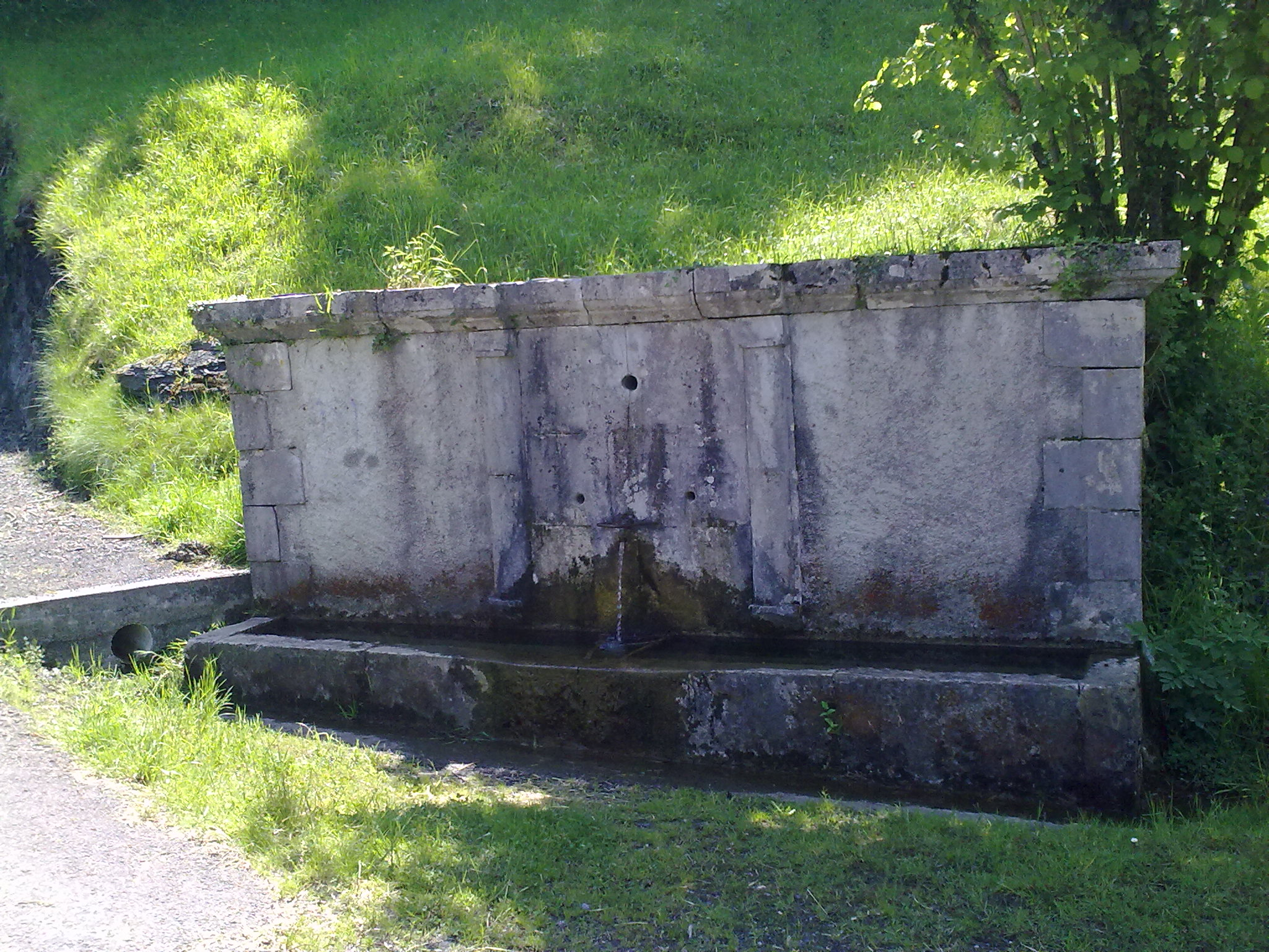 Lourdios-Ichère, France, le 23 mai 2010.